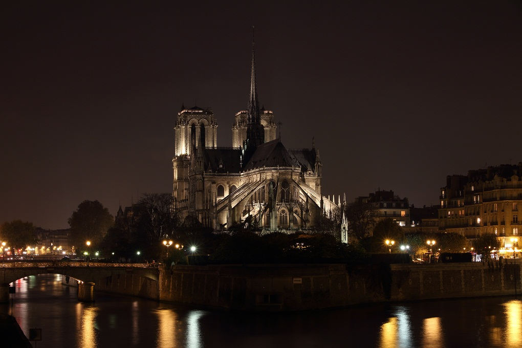 Notre-Dame de Paris, Paris, France.